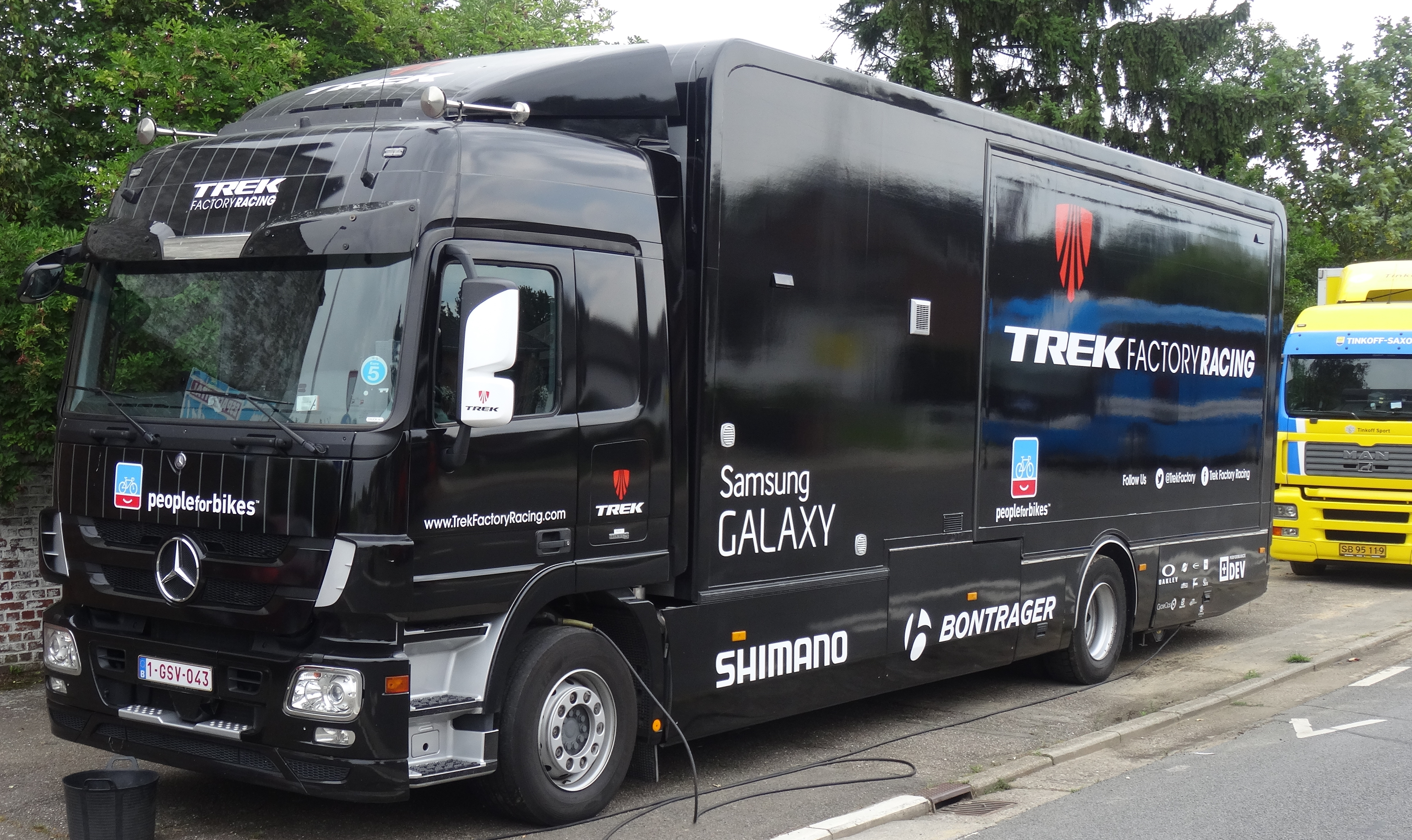 Reportage photographique réalisé le mercredi 30 juillet à l'occasion de l'arrivée de la cinquième et dernière étape du Tour de Wallonie 2014 à Alleur (Ans), Belgique.